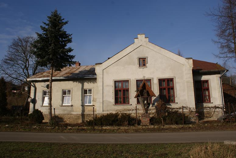 Budynek Izby Regionalnej w Śliwnicy